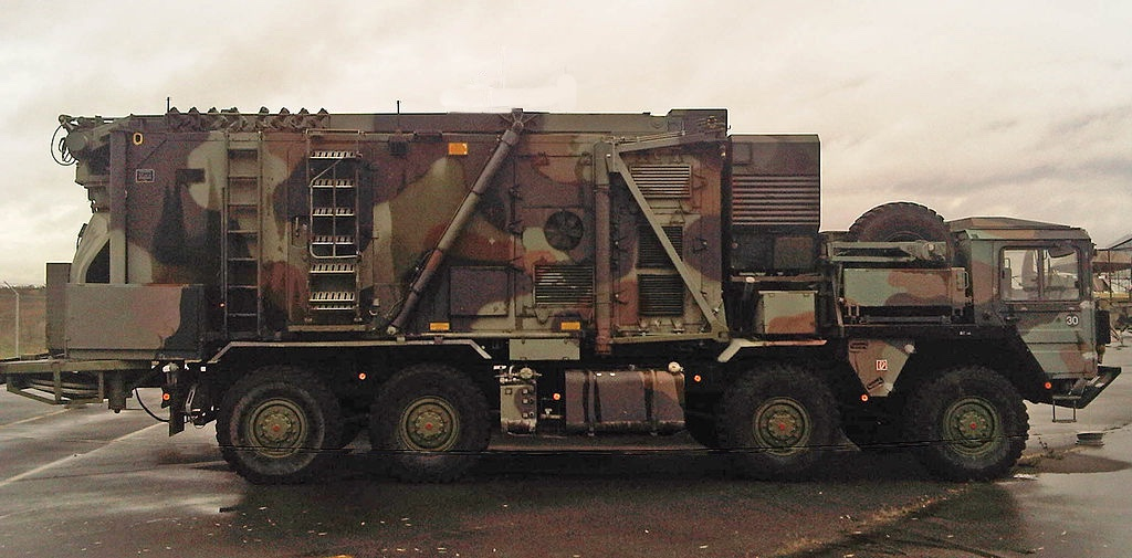 Flugabwehrgefechtsstand Roland: Antennenmast eingeklappt